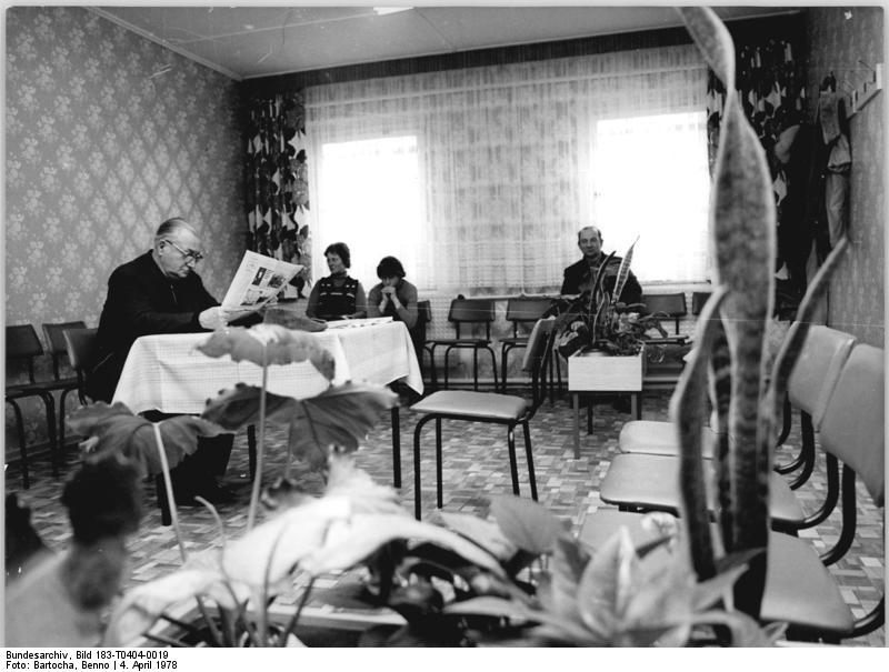 Jördenstorf, Wartezimmer der Großpraxis ADN-ZB Bartocha 4.4.78 Neubrandenburg: Neues Landambulatorium in Jördenstorf. So angenehm wie möglich wurde für die Patienten in der modernen medizinischen Einrichtung auch die Atmosphäre im Wartezimmer gestaltet. Seit Ende Februar 78 steht der Dorfbevölkerung in Jördenstorf (Kreis Teterow) ein modernes Landambulatorium zur Verfügung. (siehe auch T 0404-20N)